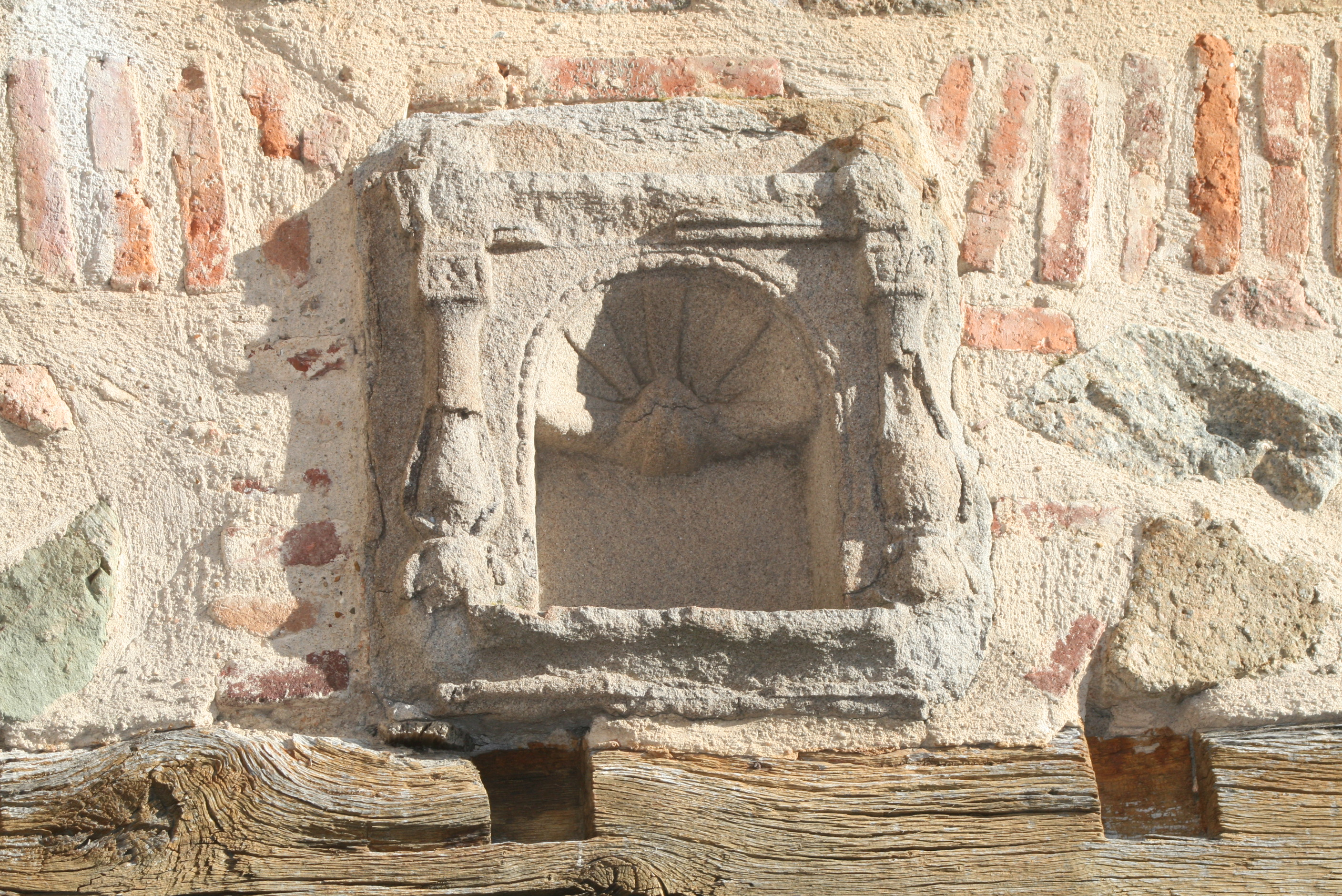 La coquille Saint Jacques de Violay